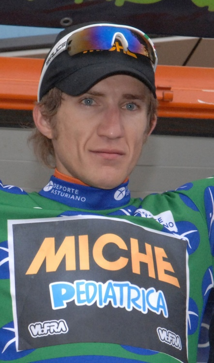 Przemysław Niemiec con el maillot de la montaña en la Vuelta a Asturias 2010